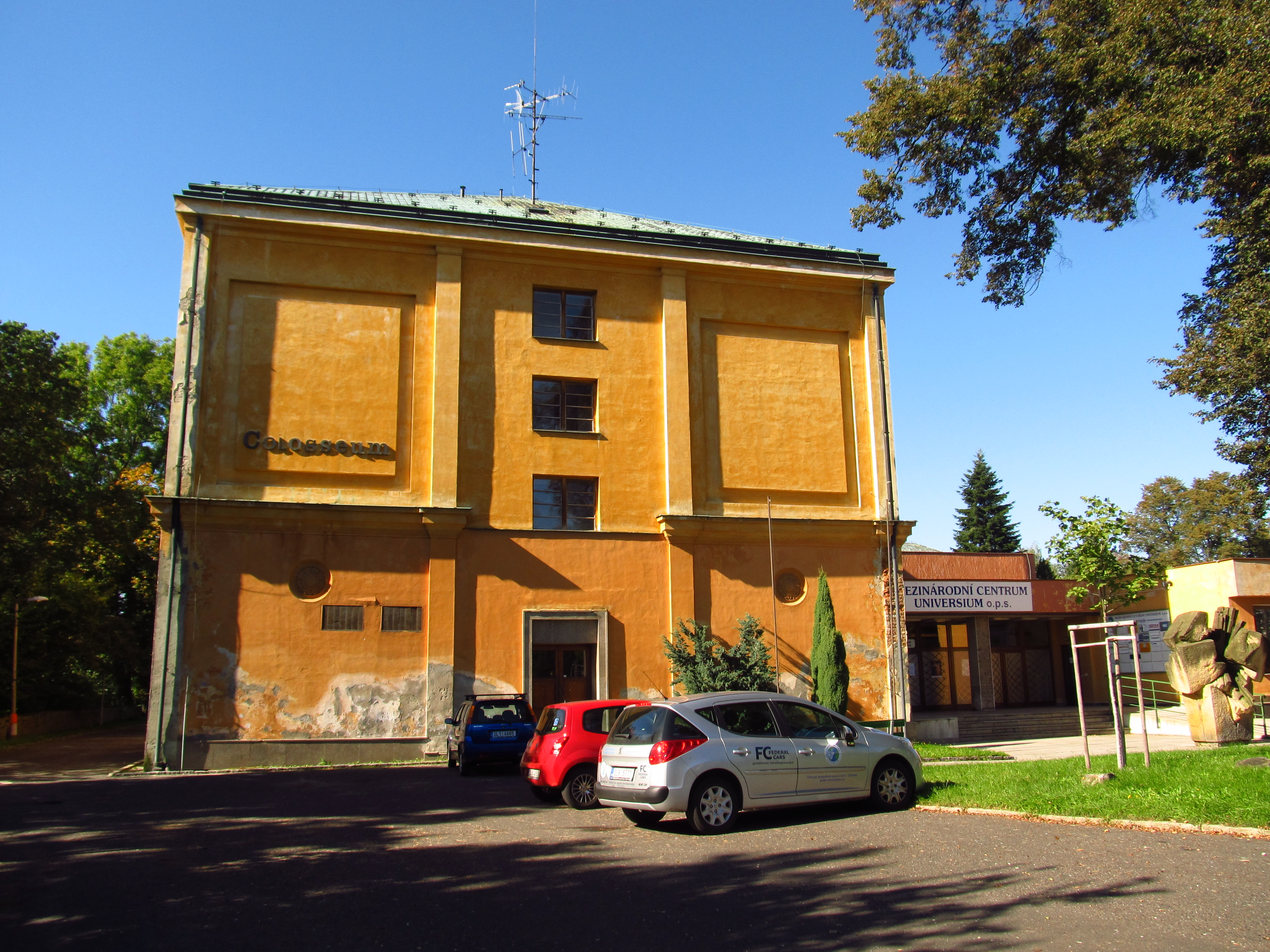 Společenský dům Kolosseum (Liberec), gen. Svobody 83/47, Liberec